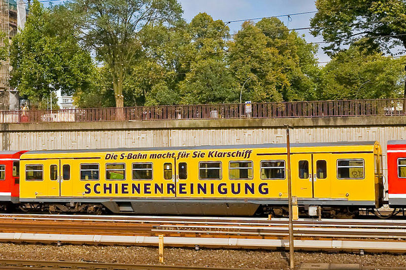 Schienenreinigungswagen der Hamburger S-Bahn. Der Mittelwagen 473 015 wurde mit einer Reinigungsanlage ausgerüstet. Zwei Hochdruckaggregate erzeugen den notwendigen Wasserdruck von 500 bar. Der Wagen führt 11.600 Liter Wasser mit. Diese Tankkapazität reicht aus, um ungefähr 150 Kilometer Schienen säubern zu können. Die Reinigung erfolgt bei einer Geschwindigkeit von etwa 40 km/h. Die Anlage wird während der Fahrt durch den Triebfahrzeugführer bedient.